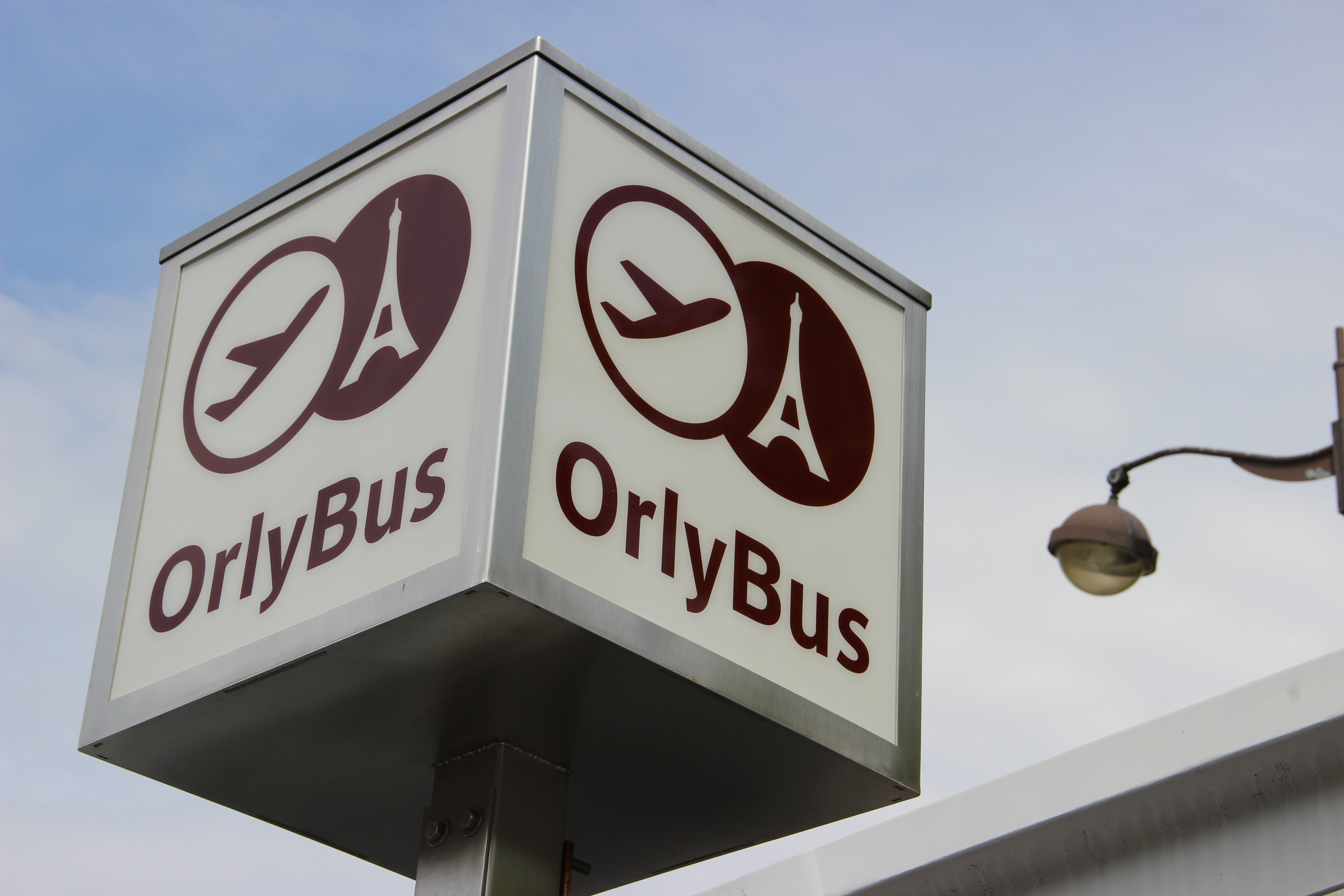 Panneau de signalisation à Denfert-Rochereau